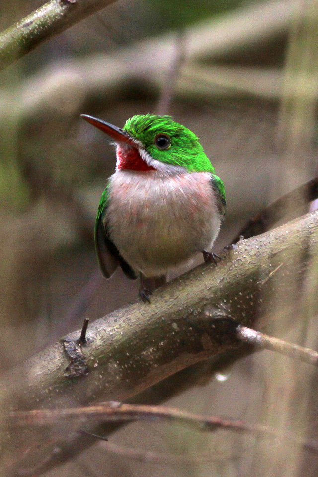 Sierra Baerucu National Park & Lago Er